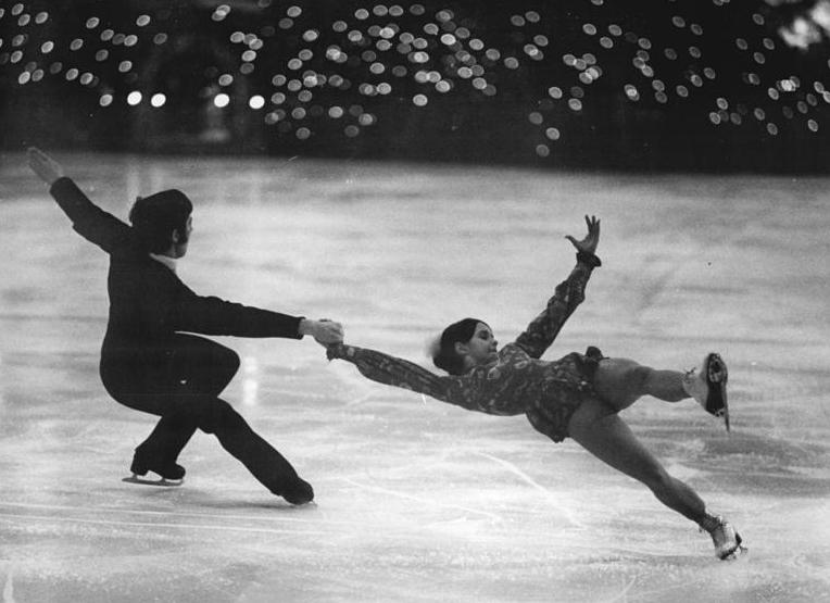 Annett Kandzy, Axel Salzmann Zentralbild Franke 26.12.1970 Berlin: Weihnachtsschaulaufen in der Dynamo-Eishalle.- Als Gäste aus Karl-Marx-Stadt nahm das Meisterpaar Annett Kandzy - Axel Salzmann am Schaulaufen teil.